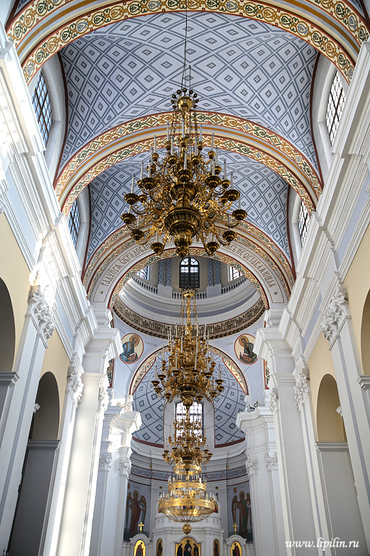 Віцебск.